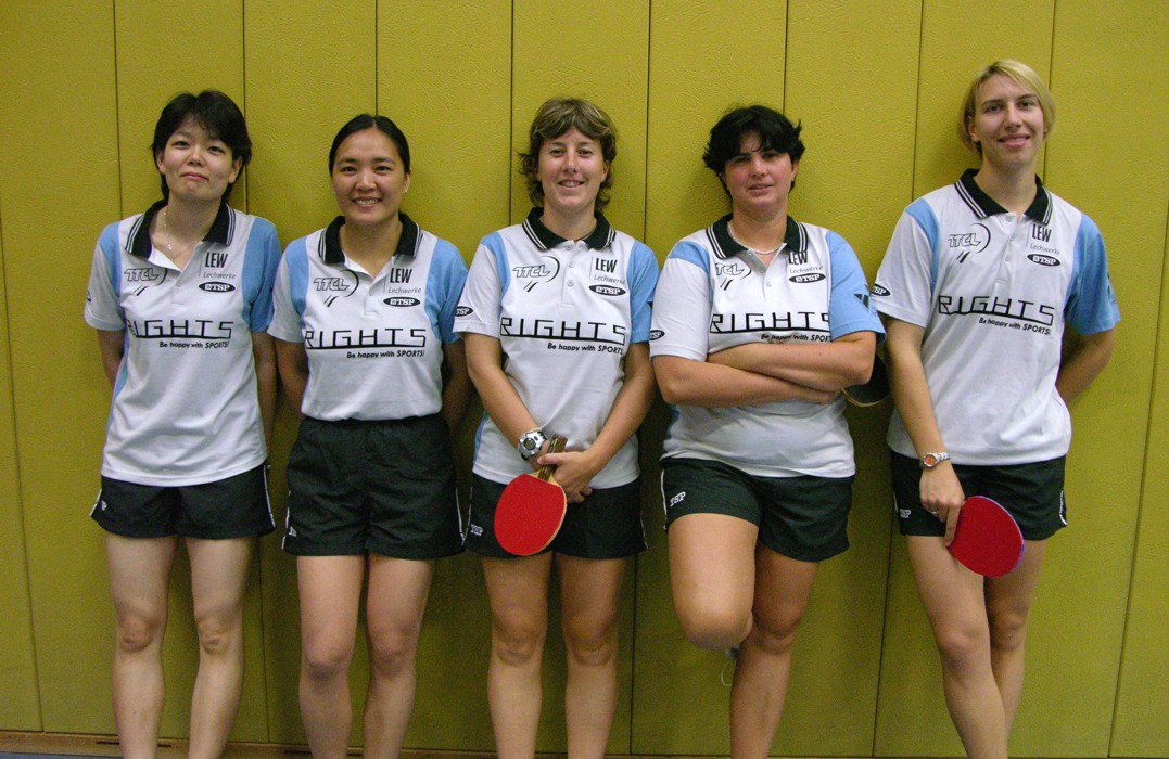 Das Team des TTC Langweid in der Saison 2005/2006: Aya Umemura, Ding Yaping, Krisztina Toth, Csilla Batorfi, Katharina Schneider